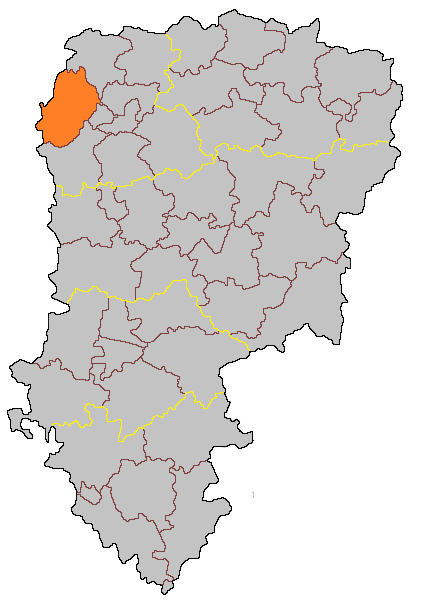 Кантон Верман на карте департамента Эна